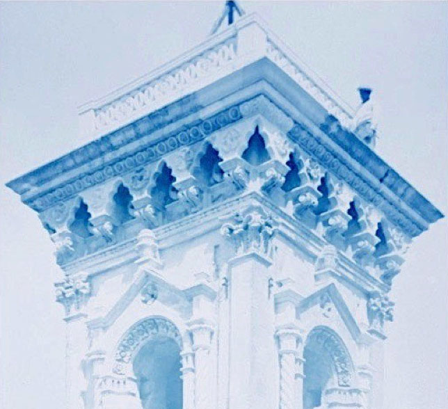 Immagine fotografata dall'album di famiglia che ne ha autorizzato l'uso.